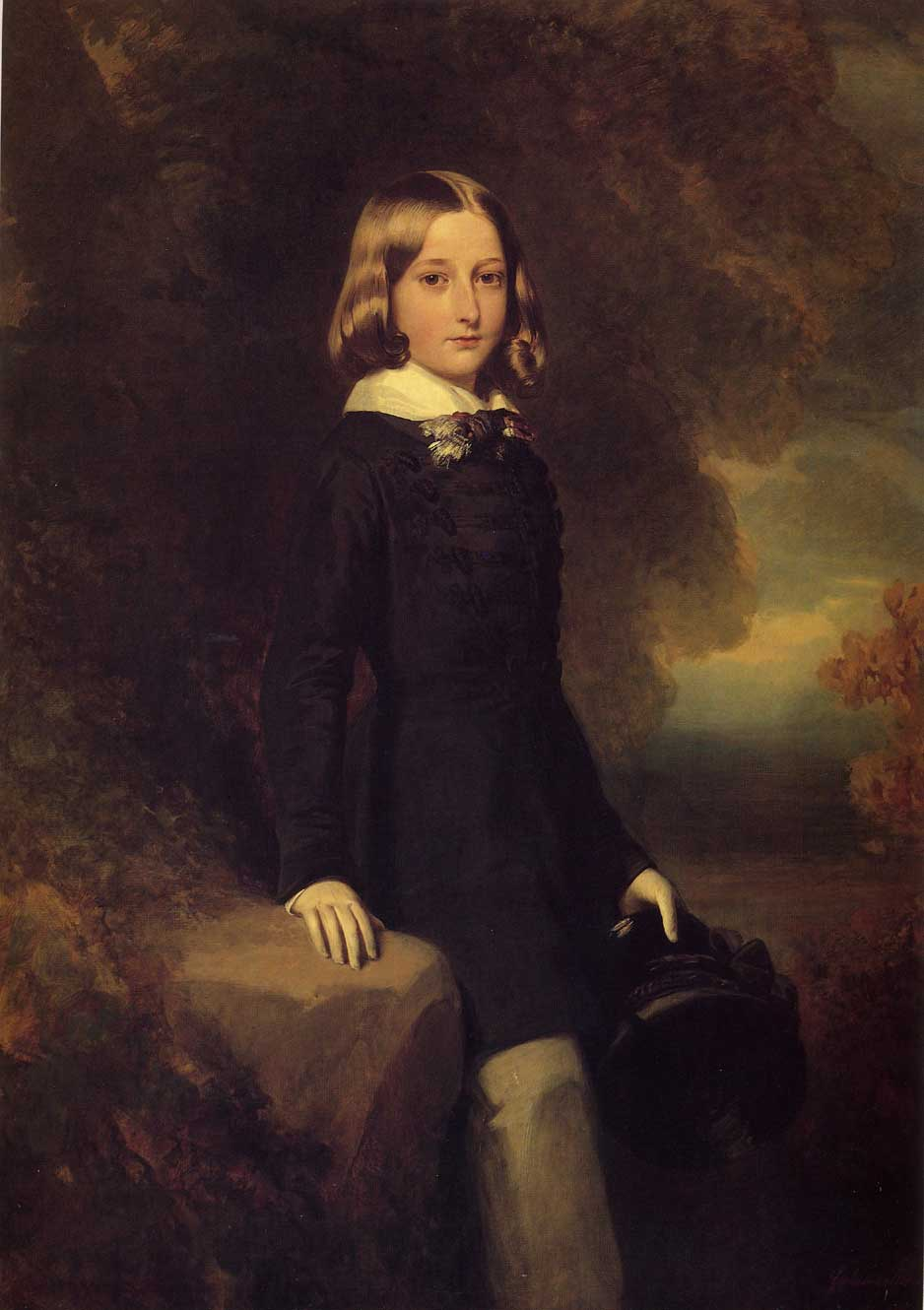 Léopold de Belgique, Duc de Brabant (1835-1909), later Léopold II, King of the Belgians